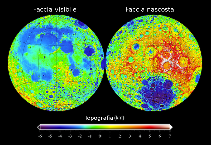 Mappa topografica delle facce lunari